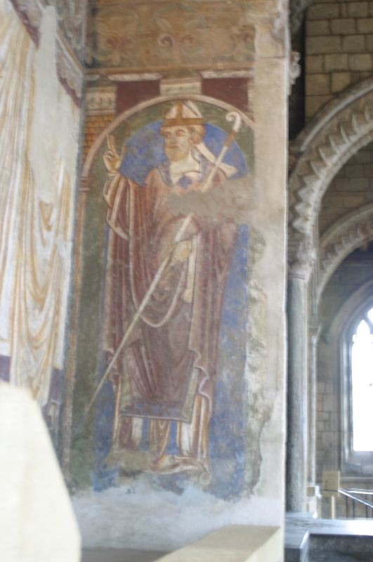 Durhamkatedralen,veggmaleri i Galiee kapellet. (Cuthbert of Lindisfarne)